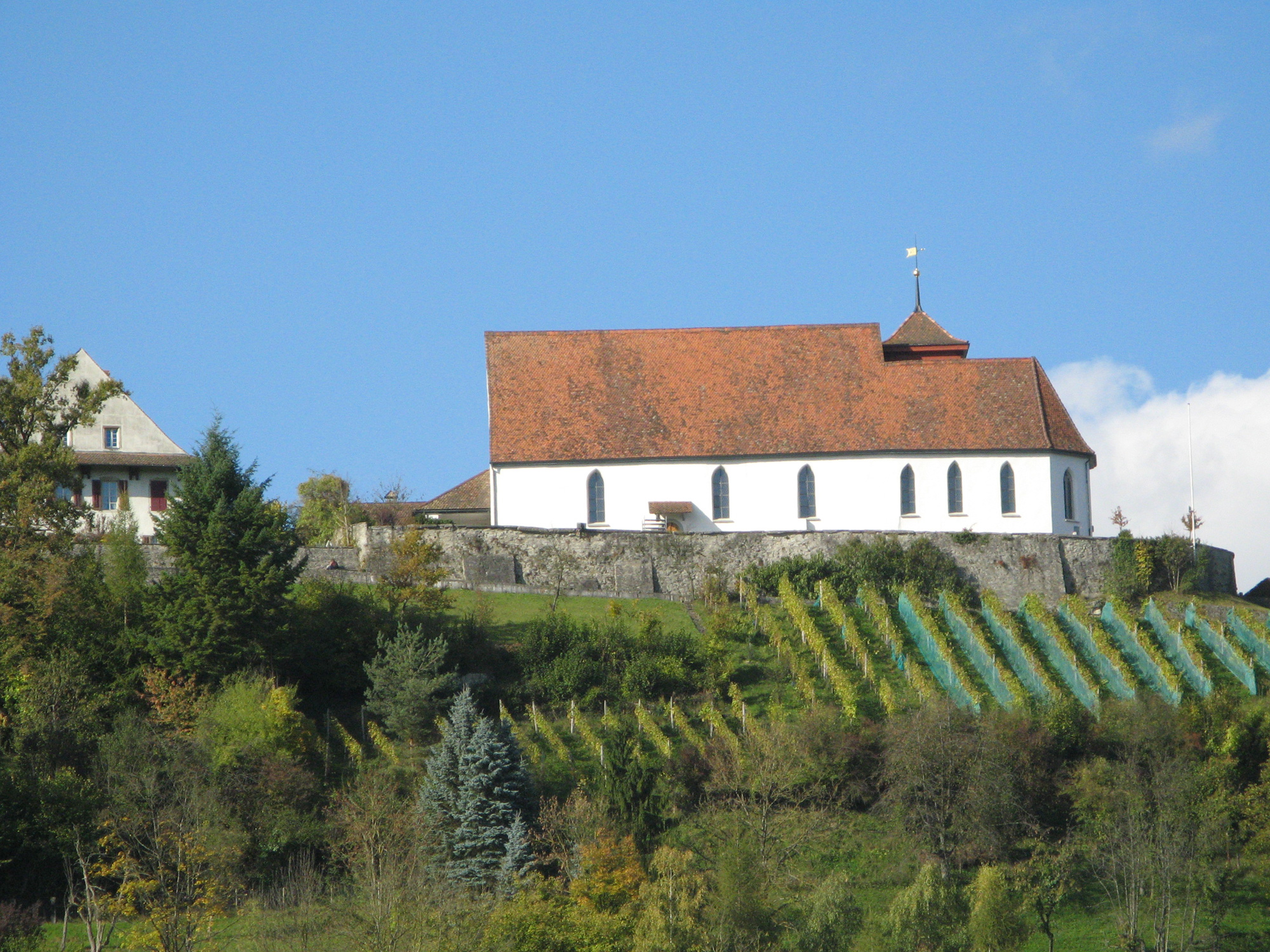 Kirche auf dem Staufberg oberhalb von Staufen, von Südosten her aufgenommen